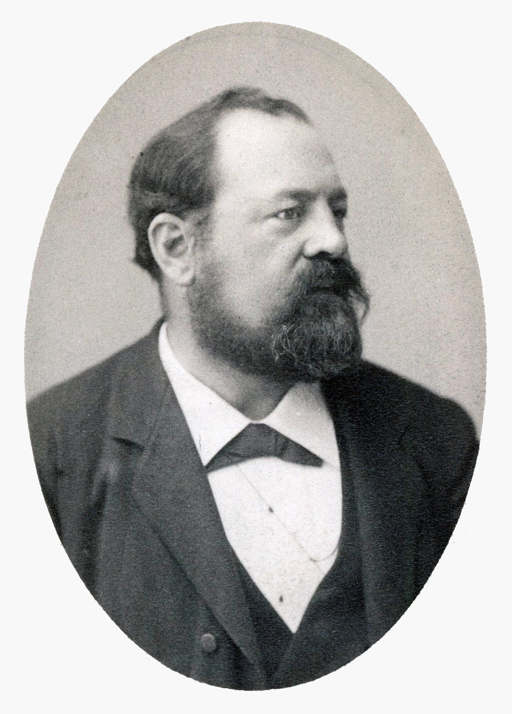 Christian Friedrich Göttisheim, erster Präsident der Freisinnig-Demokratischen Partei der Schweiz (FDP) 1894-1895